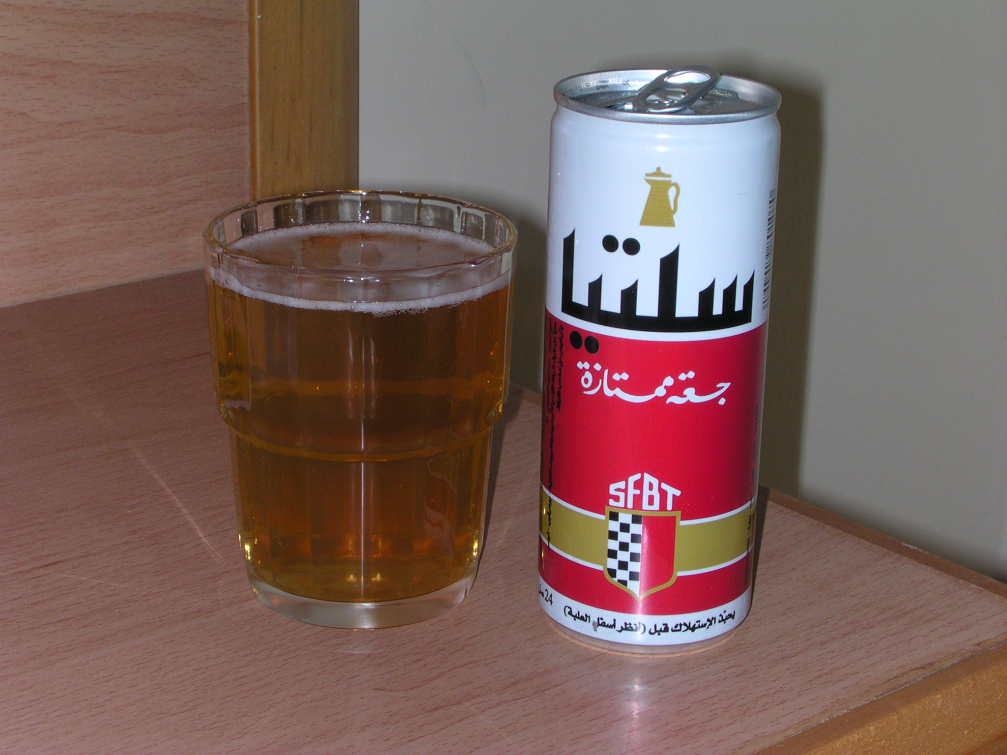 Bière tunisienne de la marque Celtia